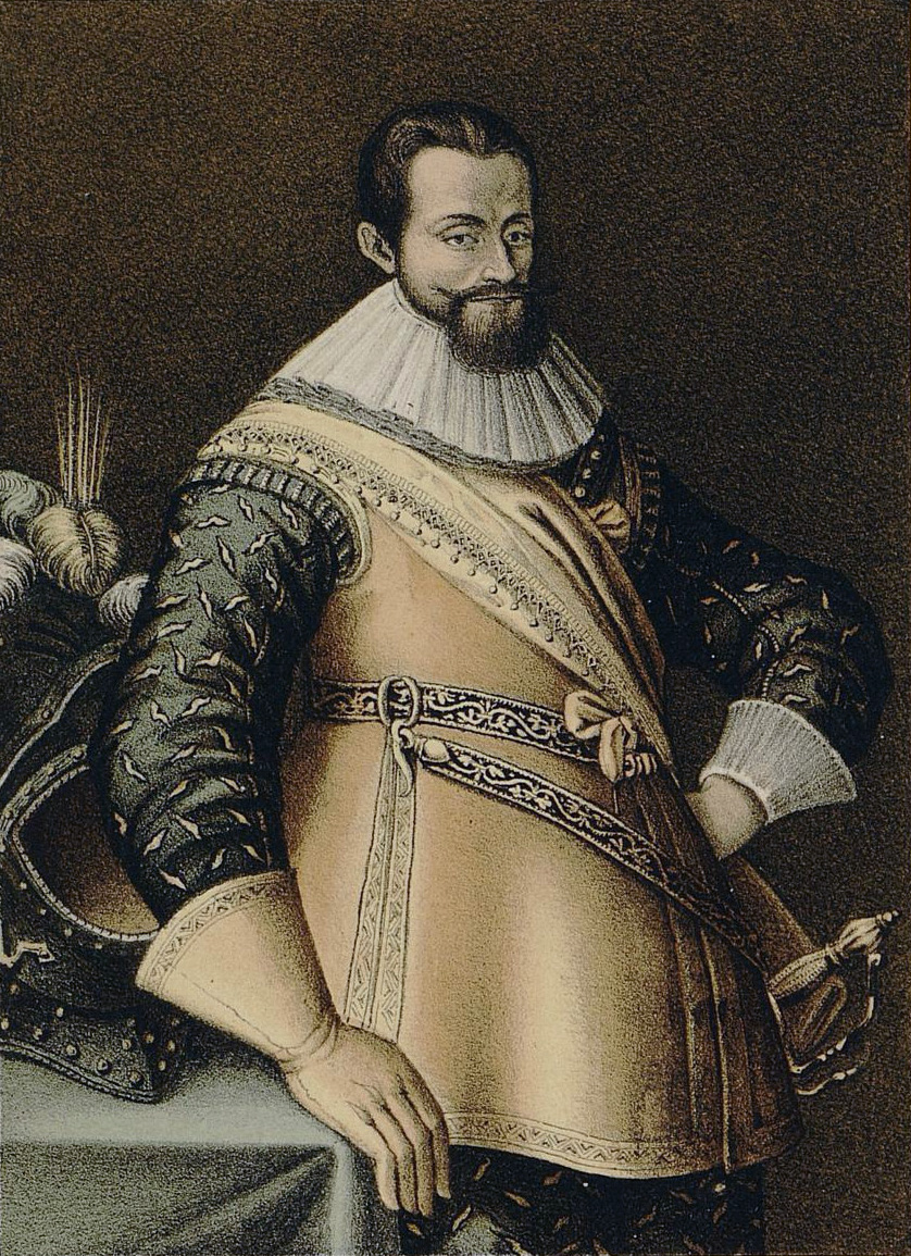 Porträt des Martin Schenk von Nideggen